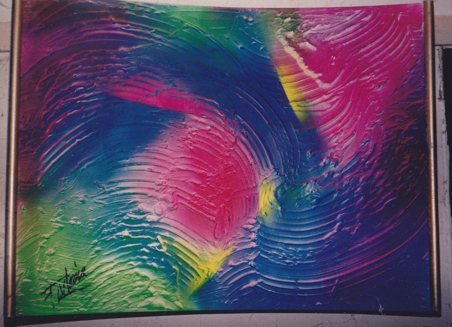 photo d'un tableau grandeur moyenne du peintre Fontaine